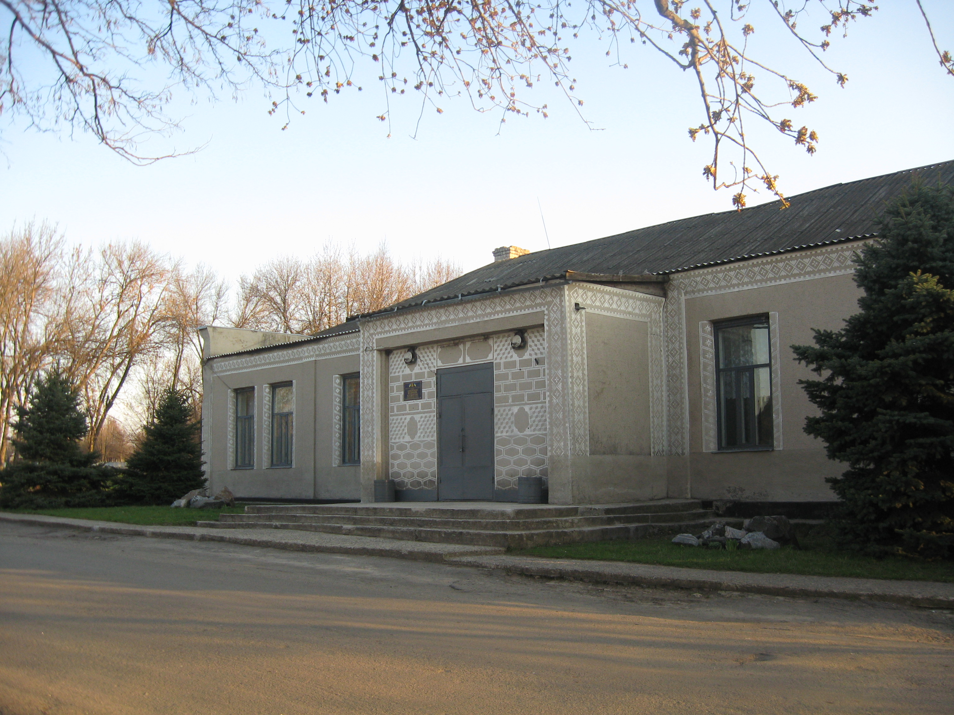 Дом культуры с. Зайцево Синельниковского района Днепропетровской области